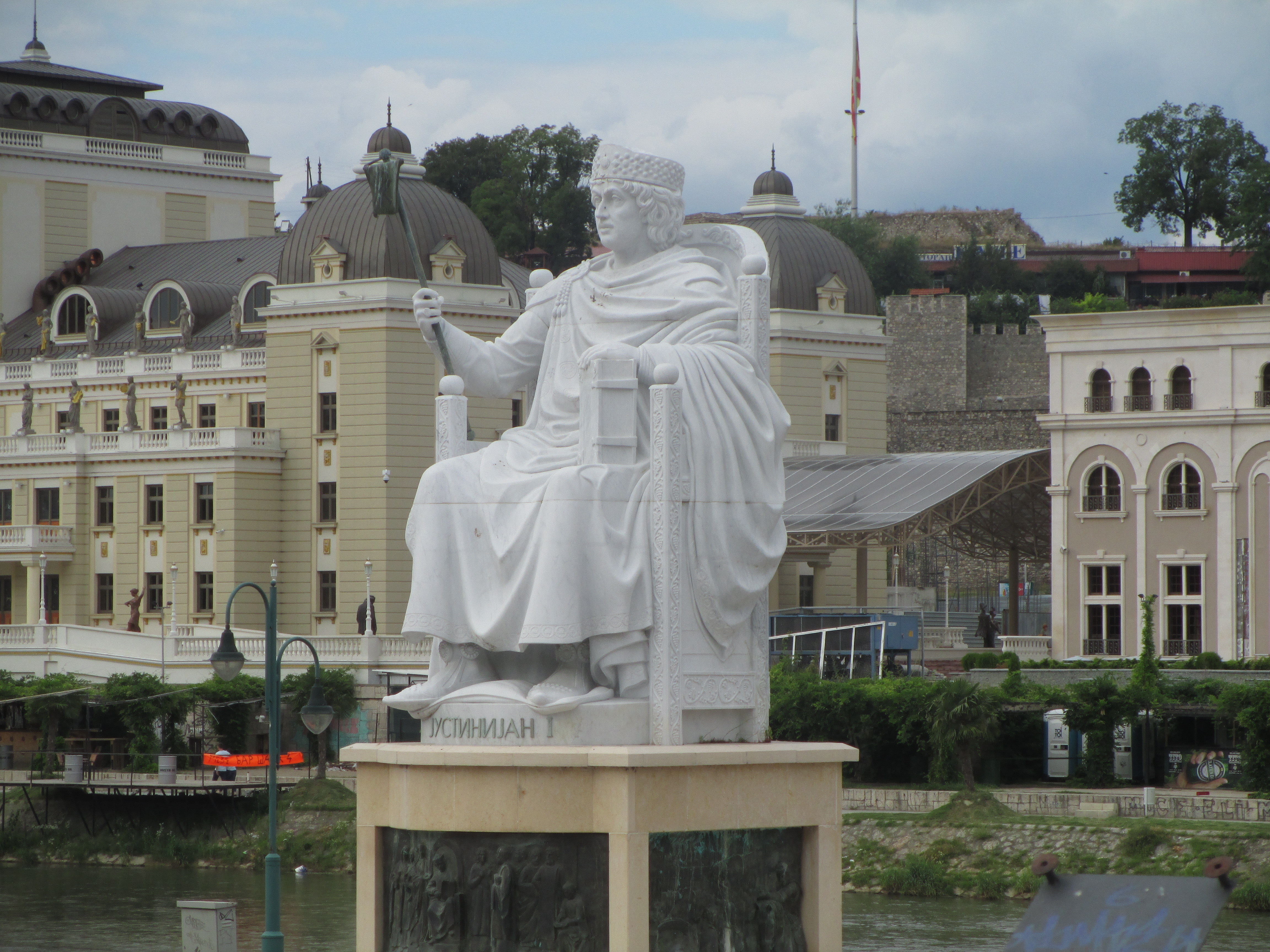 פסל יוסטיניאנוס הראשון בסקופיה